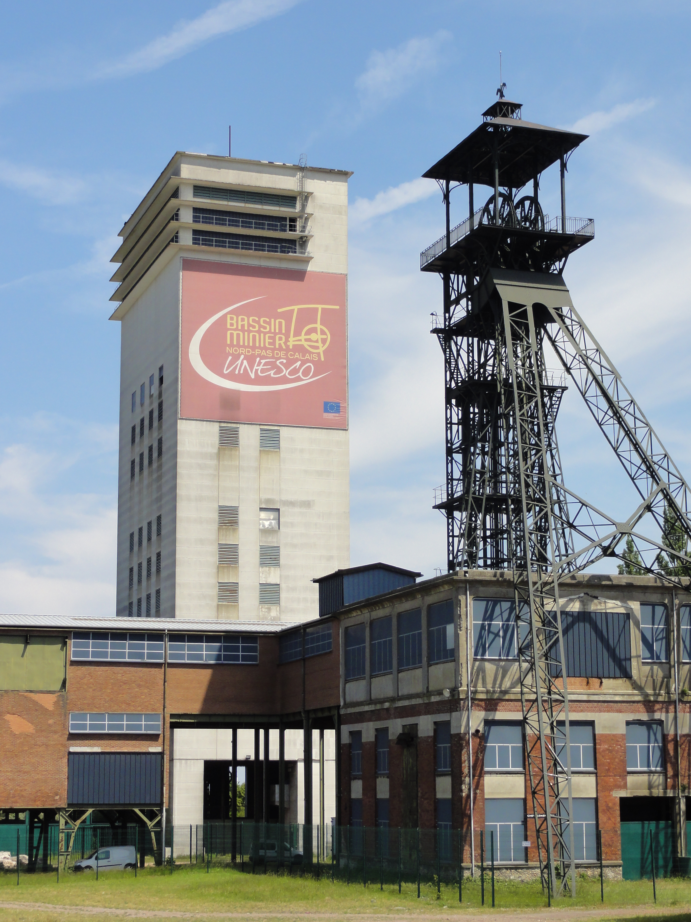 La fosse no 11 - 19 de la Compagnie des mines de Lens était un charbonnage du bassin minier du Nord-Pas-de-Calais constitué de deux puits situé à Loos-en-Gohelle, Pas-de-Calais, Nord-Pas-de-Calais, France. La fosse d'aérage no 11 bis est située sur un autre carreau. Les installations de surface de la fosse no 11 - 19 sont classées aux monuments historiques le 21 décembre 2009, venant remplacer l'inscription du 6 mai 1992. La fosse est également inscrite sur la liste du patrimoine mondial par l'Unesco le 30 juin 2012 et y constitue en partie le site no 63. It is indexed in the Base Mérimée, a database of architectural heritage maintained by the French Ministry of Culture, under the references PA00108467 and IA62000547 .